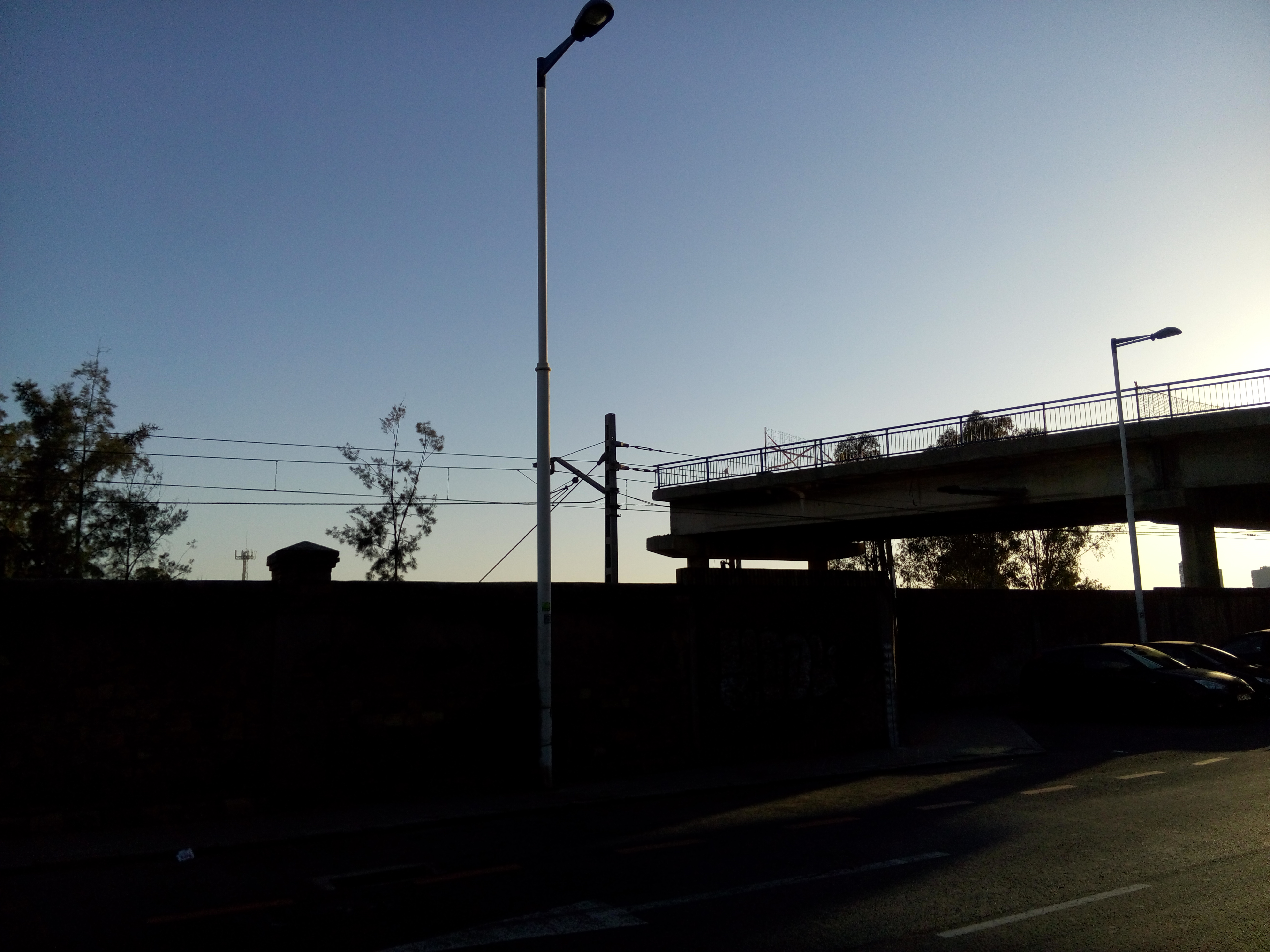 Puente demolido